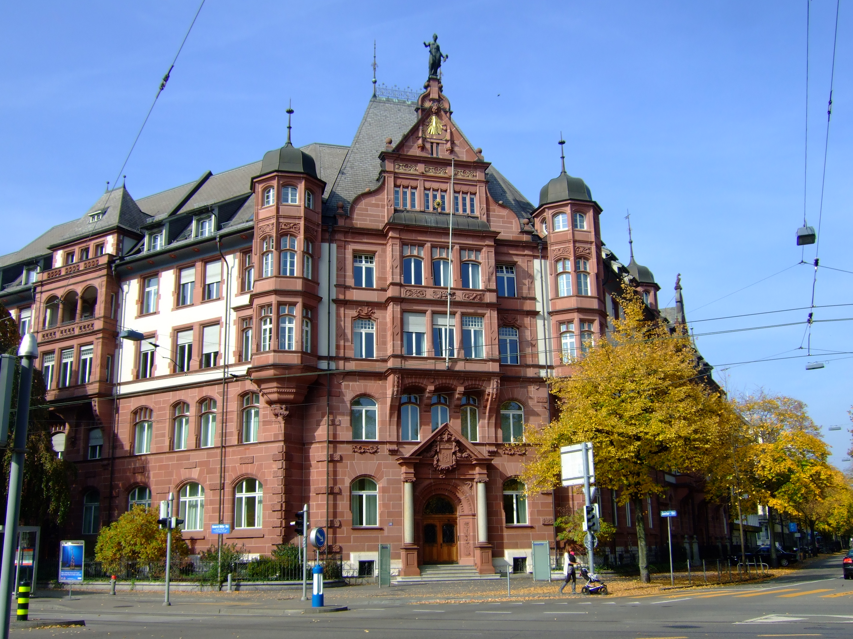 Das alte Gebäude der Rentenanstalt in Zürich an der Ecke Mythen-Quai - General Guisan-Quai. Erbaut 1898